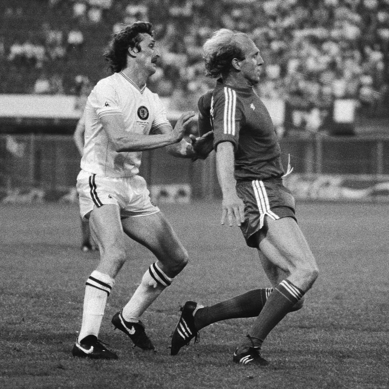 Rotterdam, 26 mei 1982. FC Bayern Munchen tegen Aston Villa 0-1 Europa Cup I; tweede van links Hoeness, derde van links Breitner in aktie.